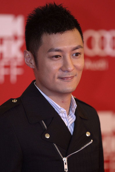 Shawn Yue